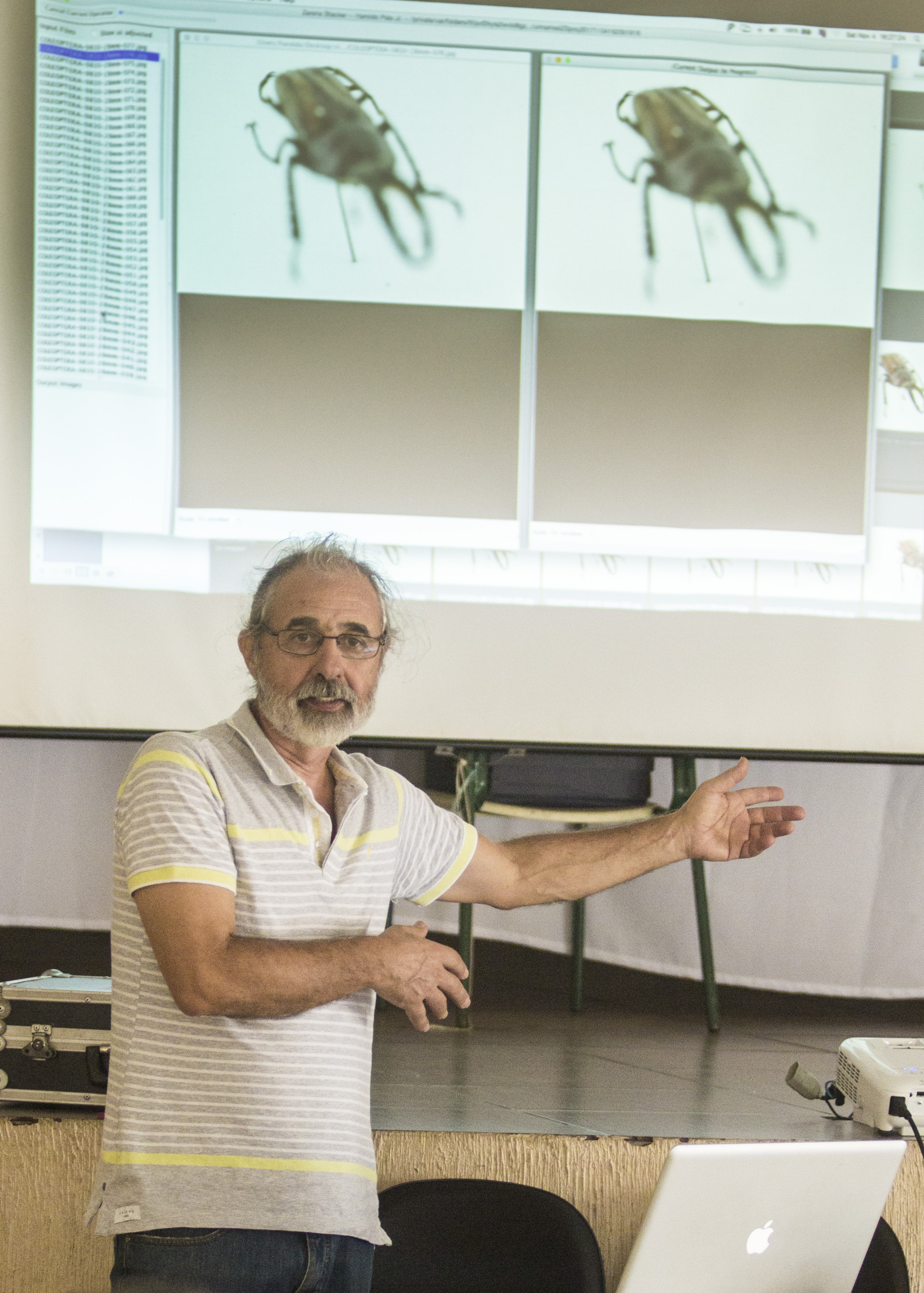 Palestra de Haroldo Palo Jr. durante o festival de fotografia "Analândia - Cidade Fotográfica" 04 de novembro de 2017.